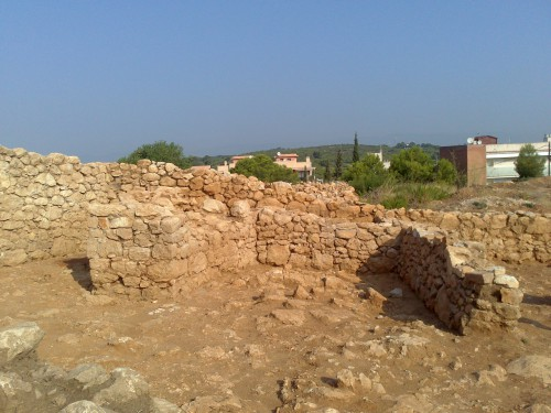 Restes muràries